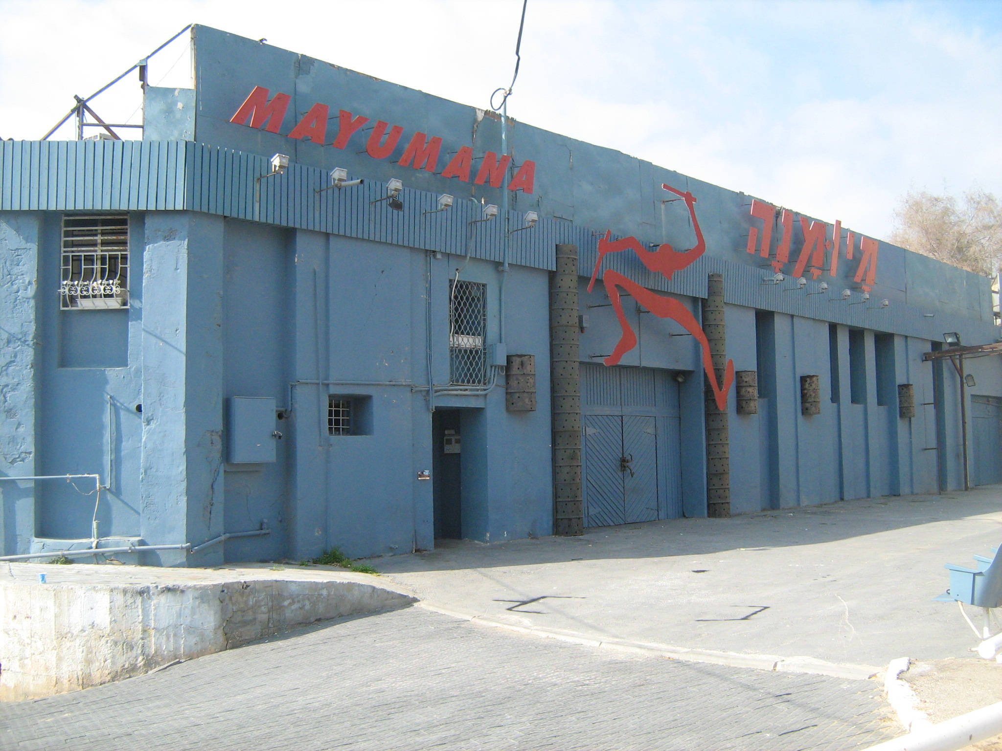 בית מיומנה ביפו